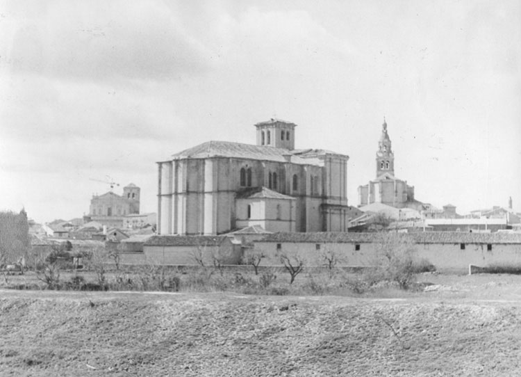 Vista panorámica - Medina de Rioseco (Valladolid) - álbum 200 x 140 - Fotografía. Papel 120 x 85 B/N